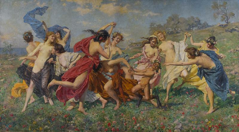 Johann Victor Krämer, Tanec Nymf, 1894